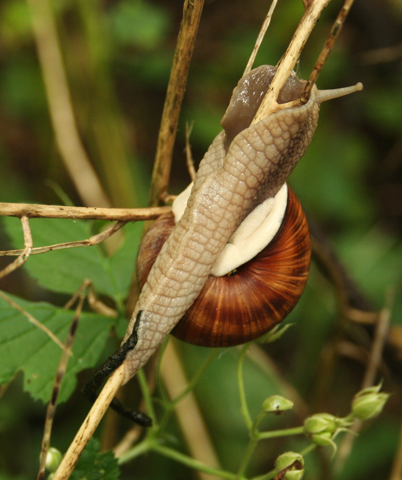 Defekacja u ślimaka, rezerwat "Lisia Góra" w Rzeszowie